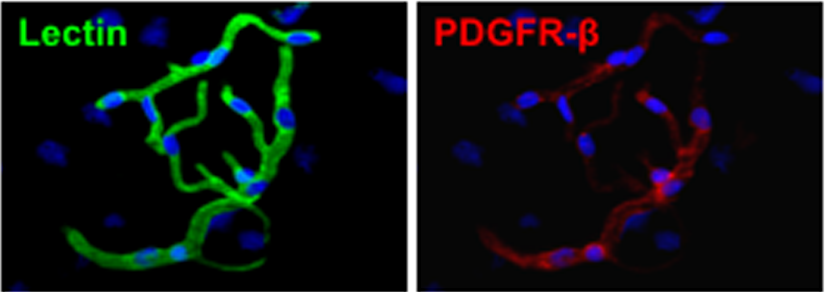 Fig. 5.A Componentes celulares de aislados de BrMV determinados por inmunotinción. Imagen izquierda: sólo se ven células endoteliales, (citoplasma en verde) delimitan la luz de los capilares. Imagen derecha: Pericitos (citoplasma en rojo) envuelven a las células endoteliales. Imágenes representativas del análisis de inmunofluorescencia para aislados de BrMV. Los aislados de BrMV del cerebro se tiñeron con lectina marcada con fluoresceína (verde) para células endoteliales formadoras de BBB, PDGFR-β anti-ratón para pericitos, y seguido de contratinción con DAPI (azul) para nucleico. Microscopio confocal. Barra de escala 50 μm.